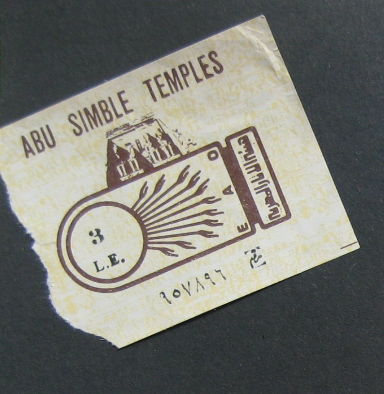 Kaartje voor Aboe Simbel